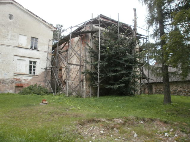 Elutorn kagust. Kuusk on suureks kasvanud.